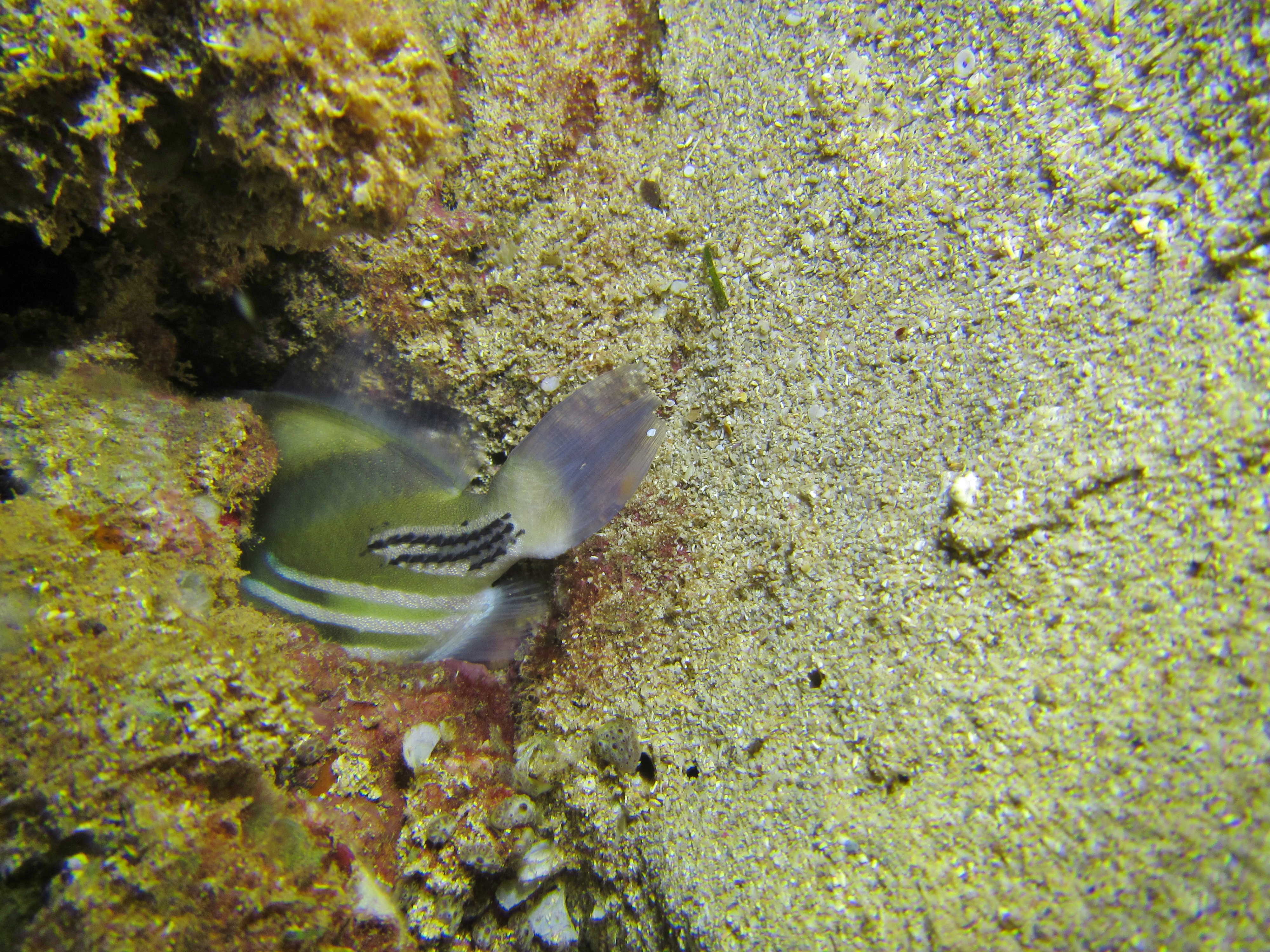 Un Rhinecanthus aculeatus dormant de nuit, coincé dans une anfractuosité, à Mayotte.